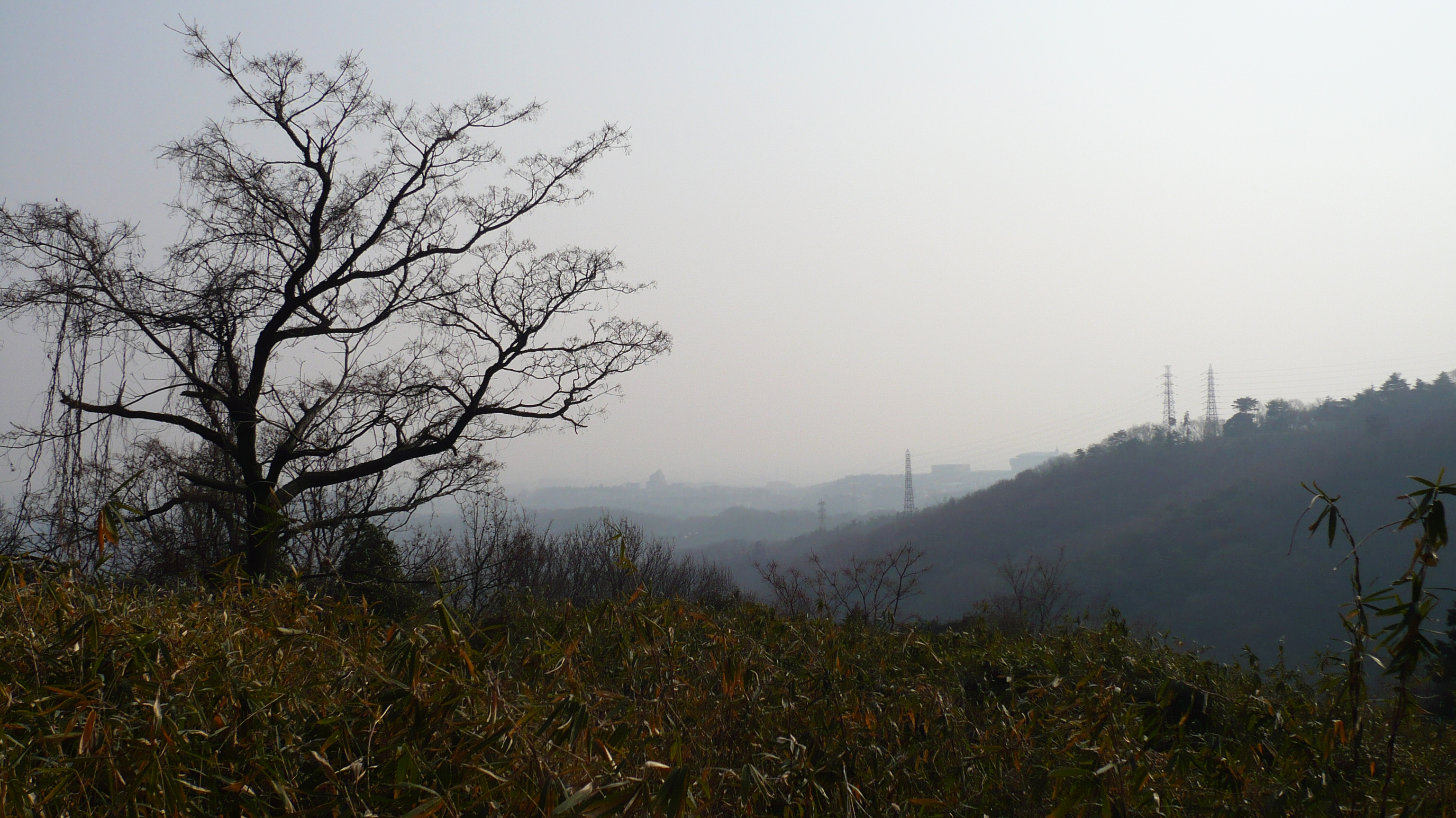 芥川山城からの眺望